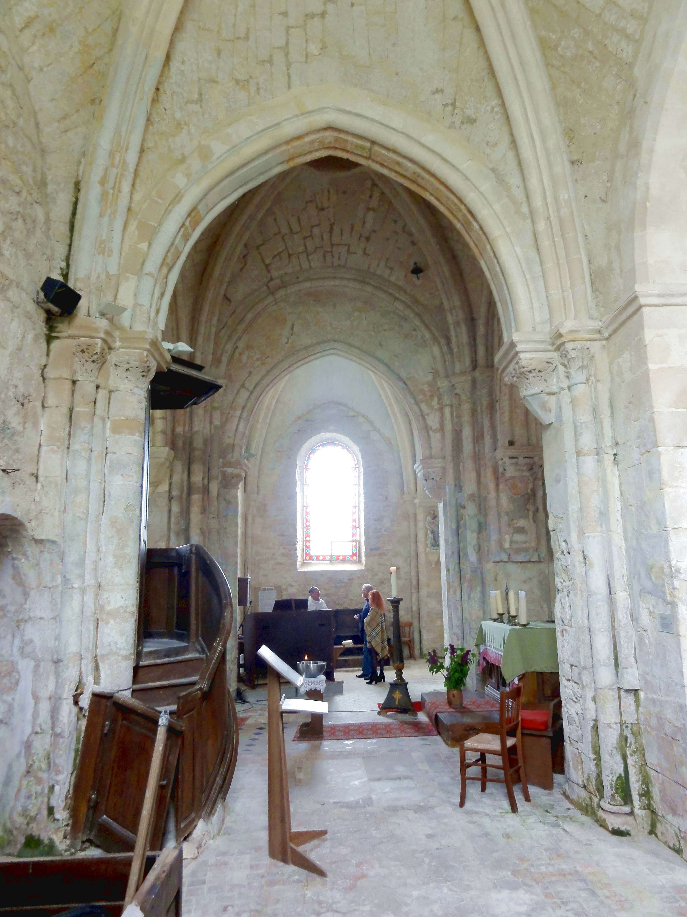 Intérieur de l'église - voir titre.